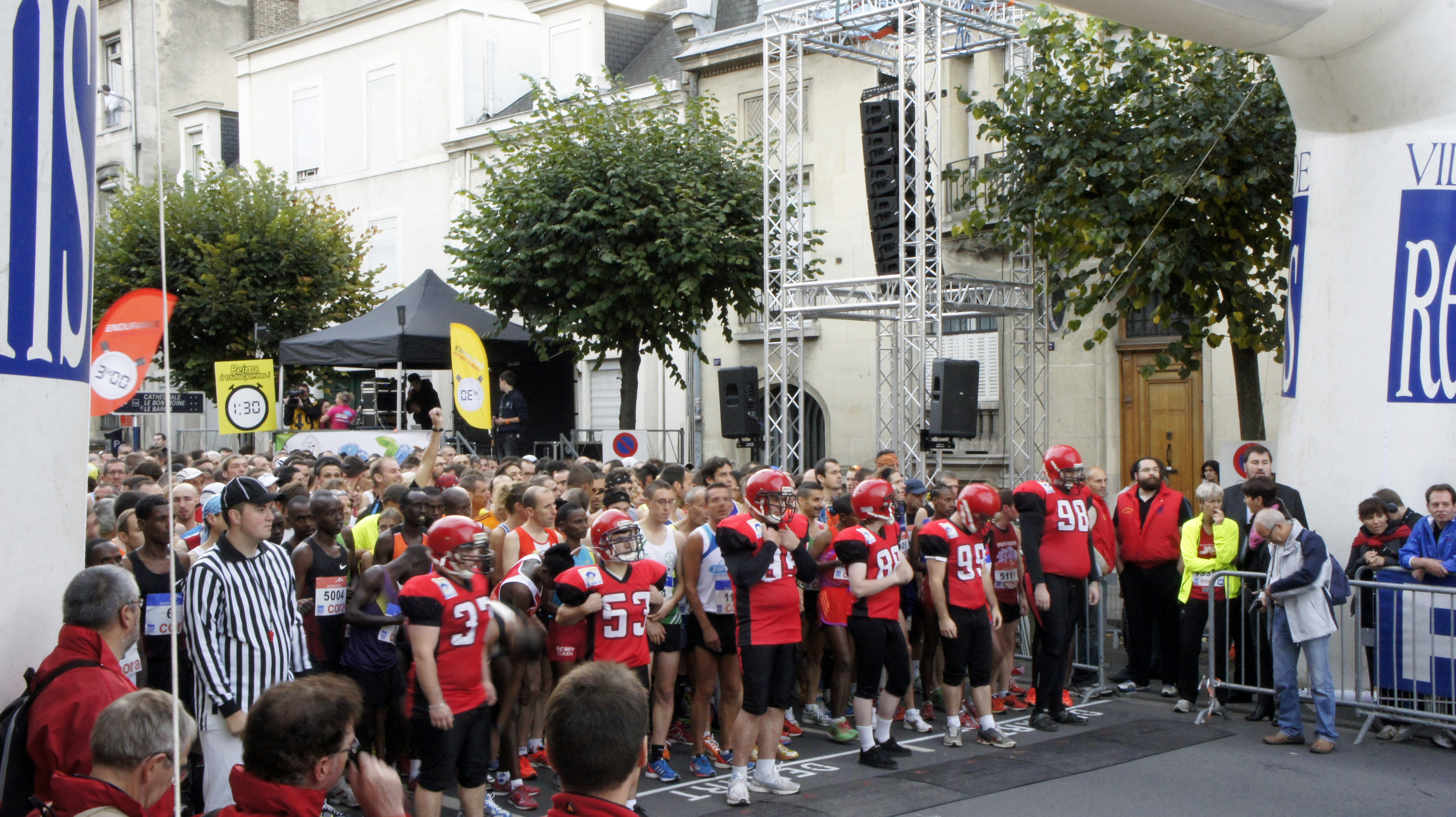 La ligne de départ du marathon.